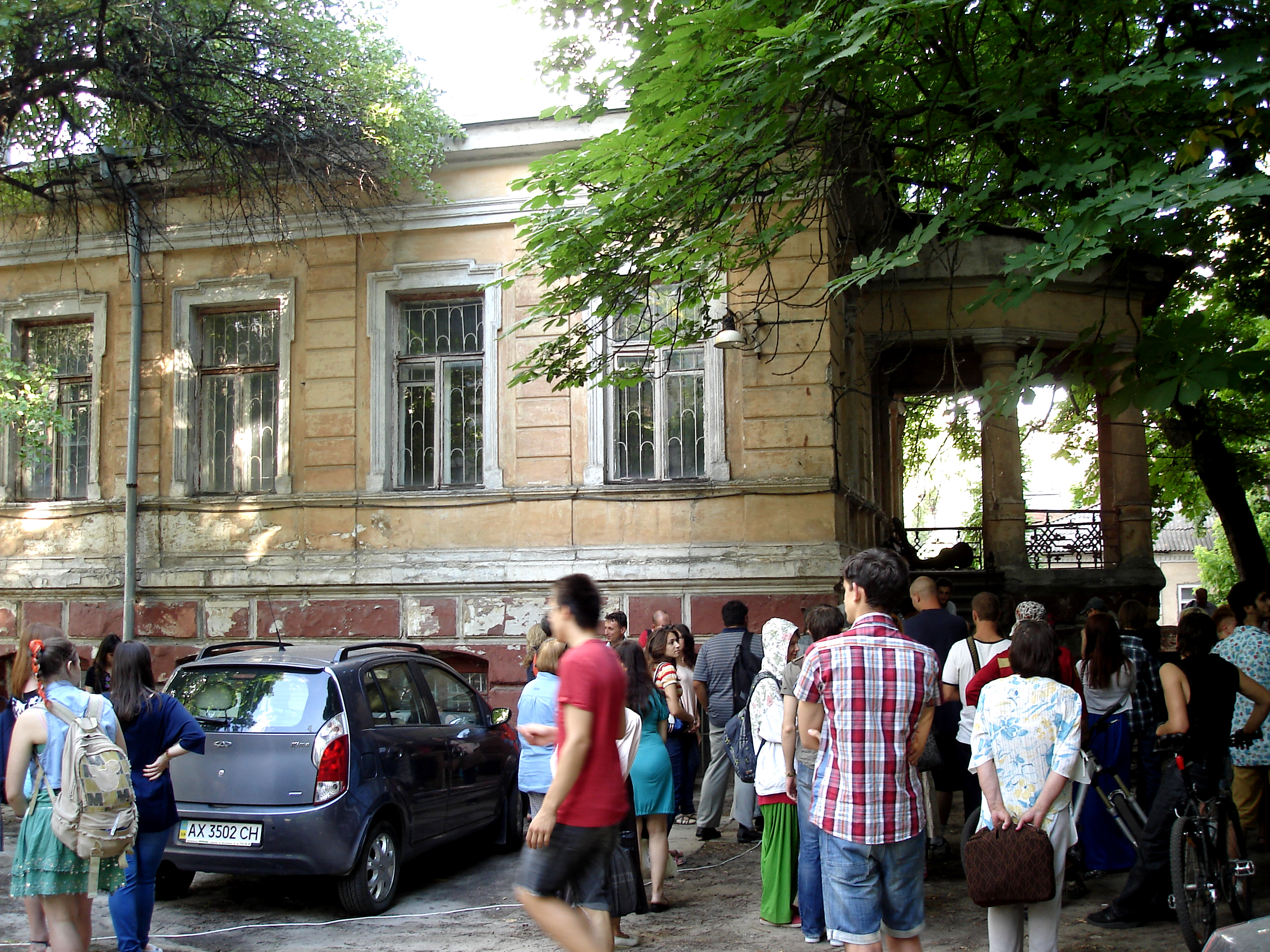 Акція естетичного спротиву «Шаляпін Forever» на захист будинку Сурукчі, що належав харківському лікарю-оториноларингологу Степану Гавриловичу Сурукчі. В ньому проходили творчі вечори, в яких брали участь відомі митці, зокрема, Федір Шаляпін та Олександр Вертинський біля цього будинку. м. Харків, 21 червеня 2013 року.Учасники та слухачі акції.